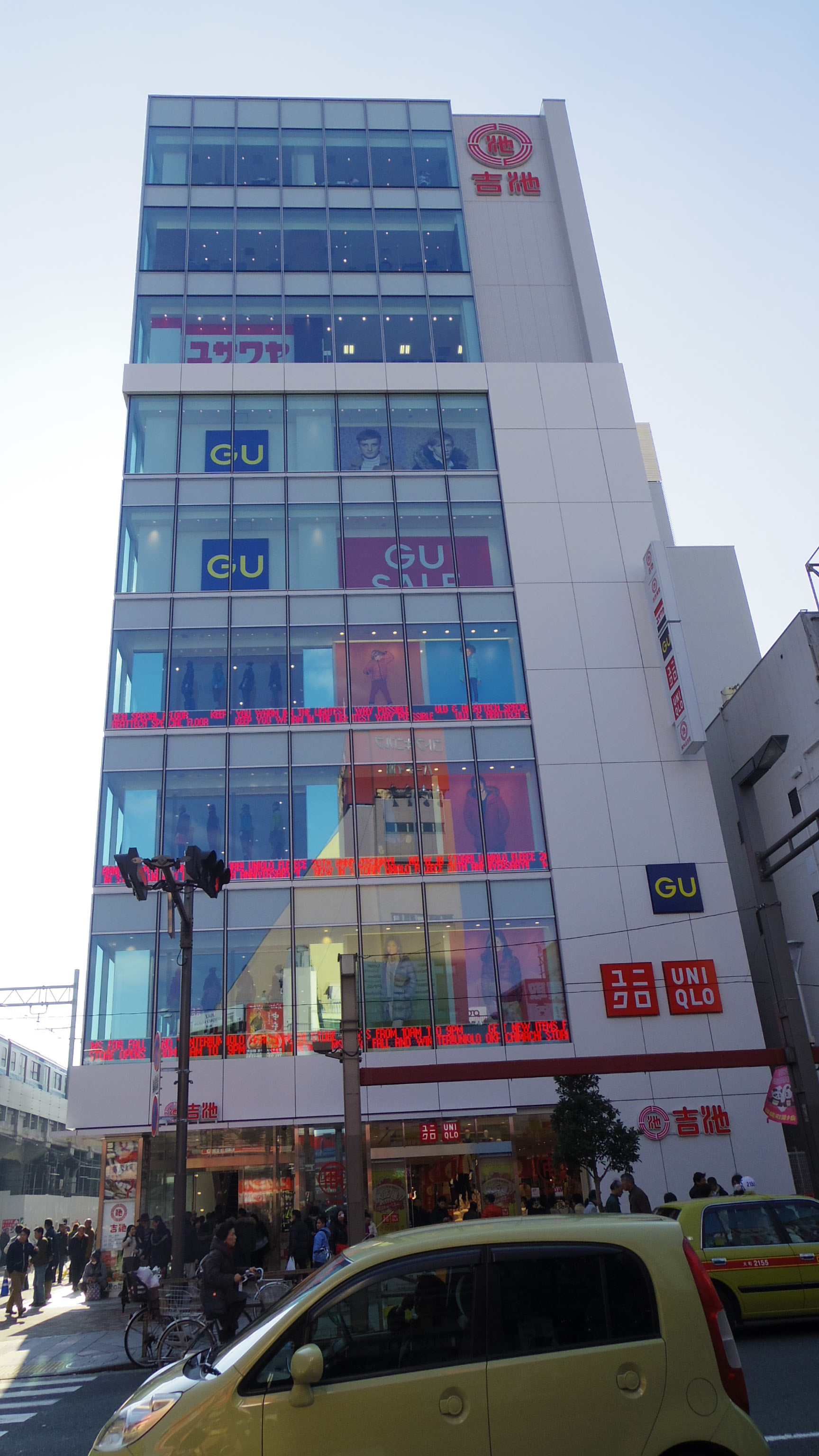 東京都台東区上野にある吉池新本店ビル（2014年12月30日撮影）。